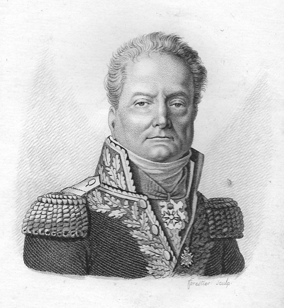 Le général Pierre Margaron (1765-1824), général du Premier Empire. Il commandait une division de cavalerie à Austerlitz.